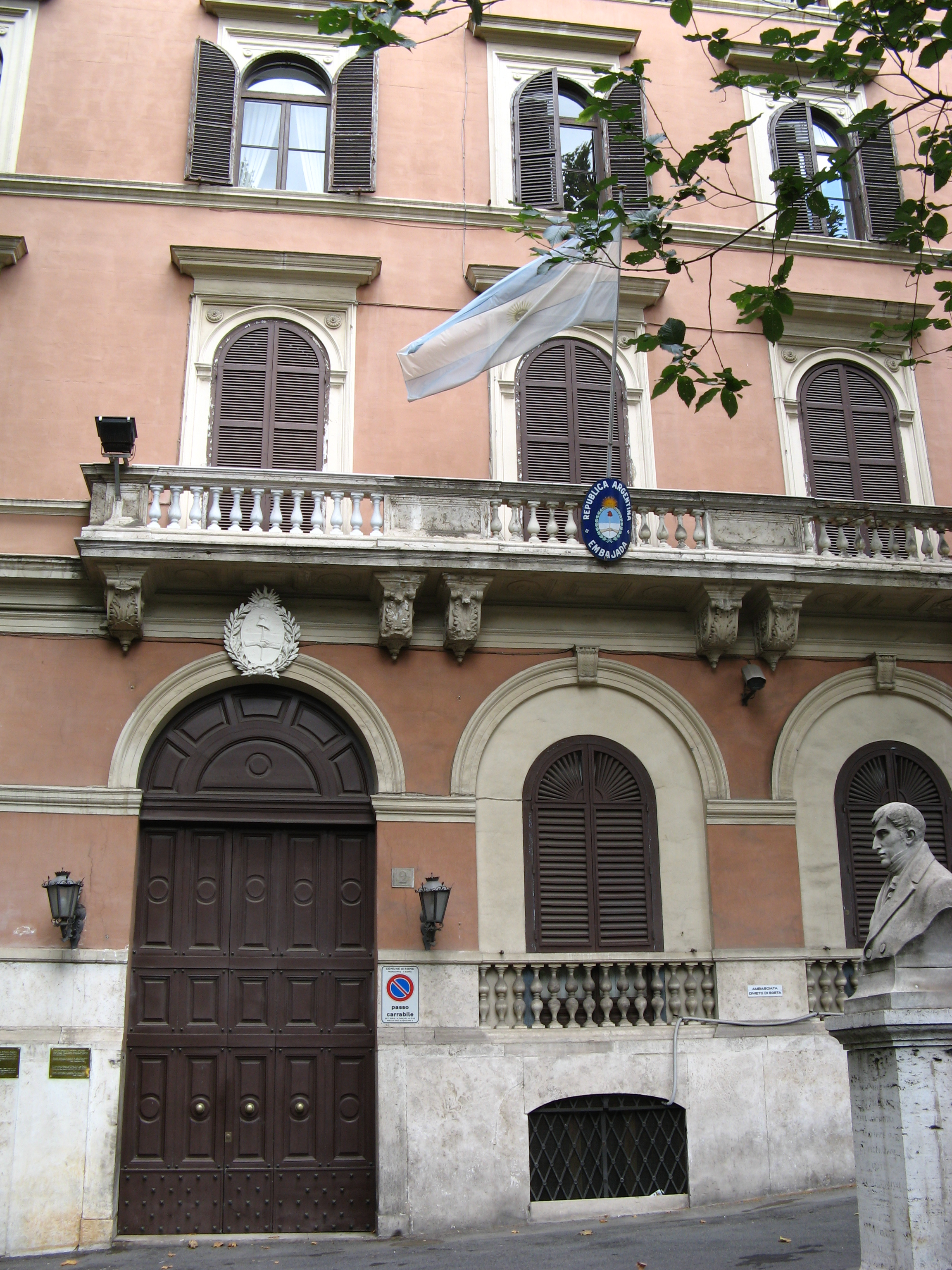 Ambasciata Arg, Roma, Italy